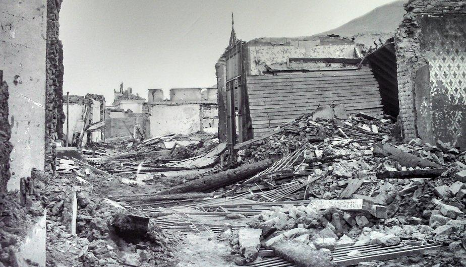 WAR-RUINS-CHORRILLOS